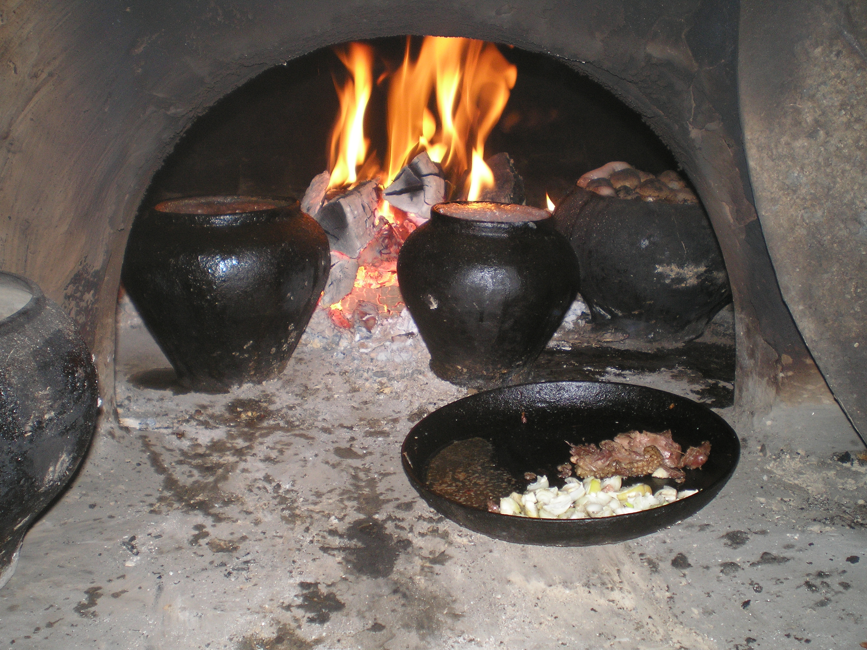 піч, с. Конятин